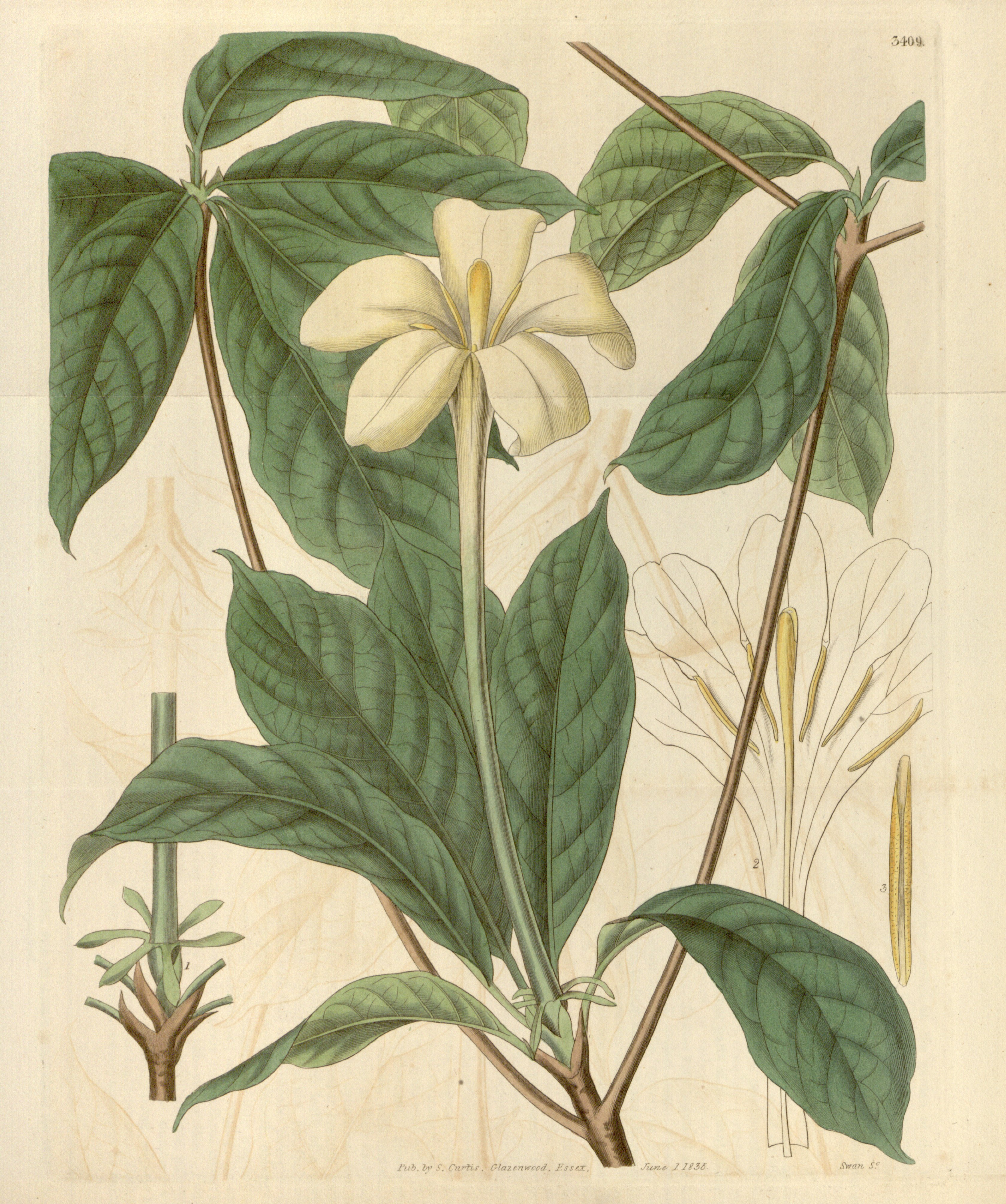 Euclinia longiflora